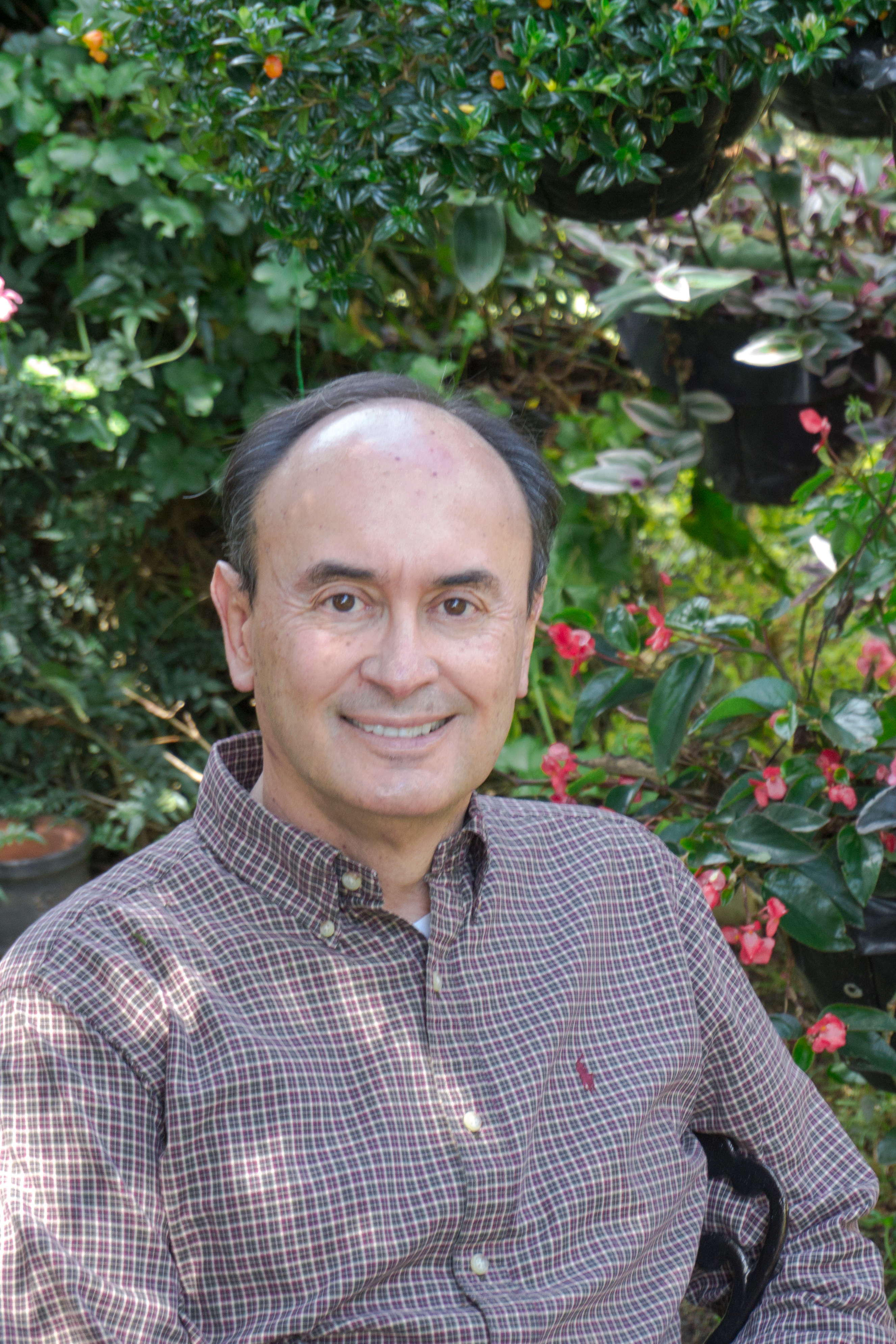 Bogotá (Colombia) 2018